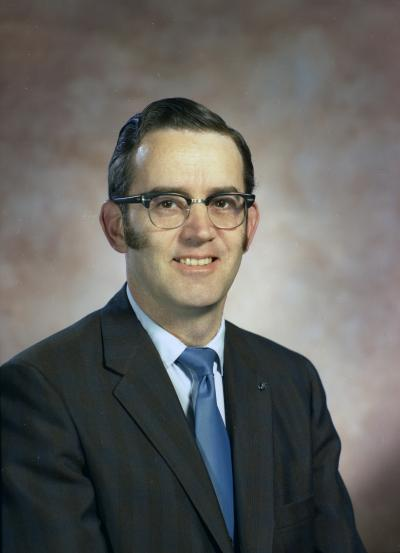 Representative Bill Kiskaddon, 1971